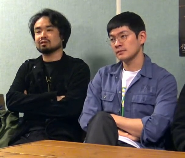 하세가와 요헤이와 장기하